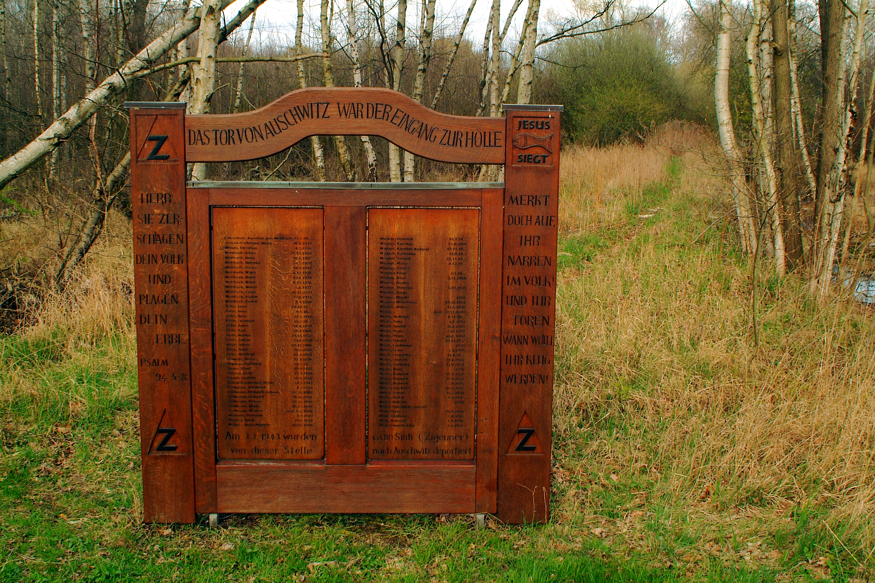 Das Mahnmal für die Sinti im Altwarmbüchener Moor, Blick auf den Pfad ins Moor